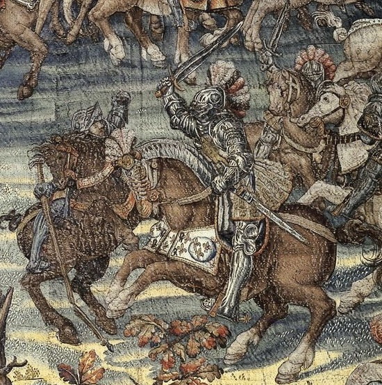 Arazzi Battaglia di Pavia - Francesco I uccide Ferrante Castiorta